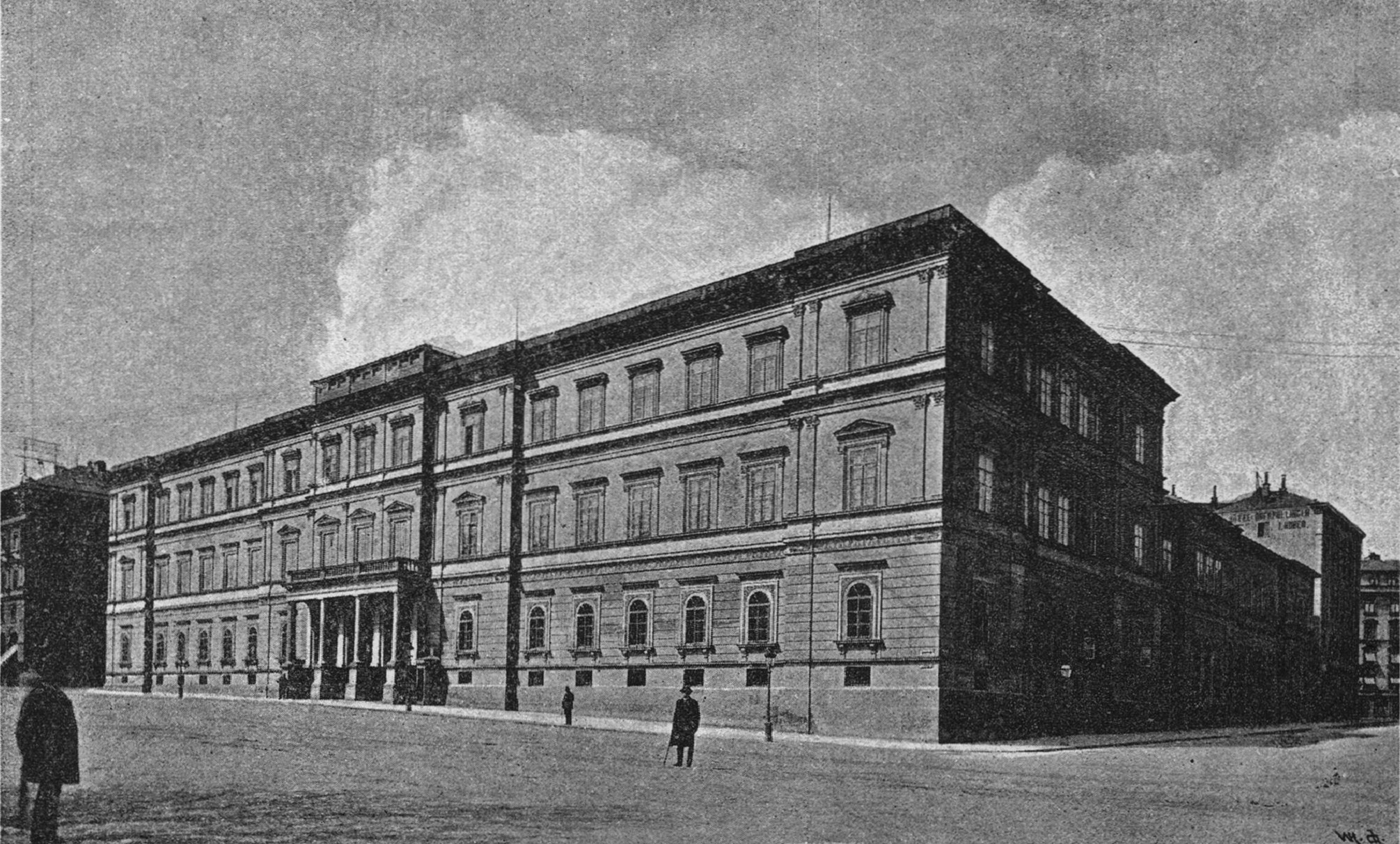 Kronprinzenpalais, Stuttgart. Ansicht von der Königstraße mit Seitenflügel an der Fürstenstraße (rechts) und Nebengebäude (hinten in der Fürstenstraße). Foto von 1889 oder früher.